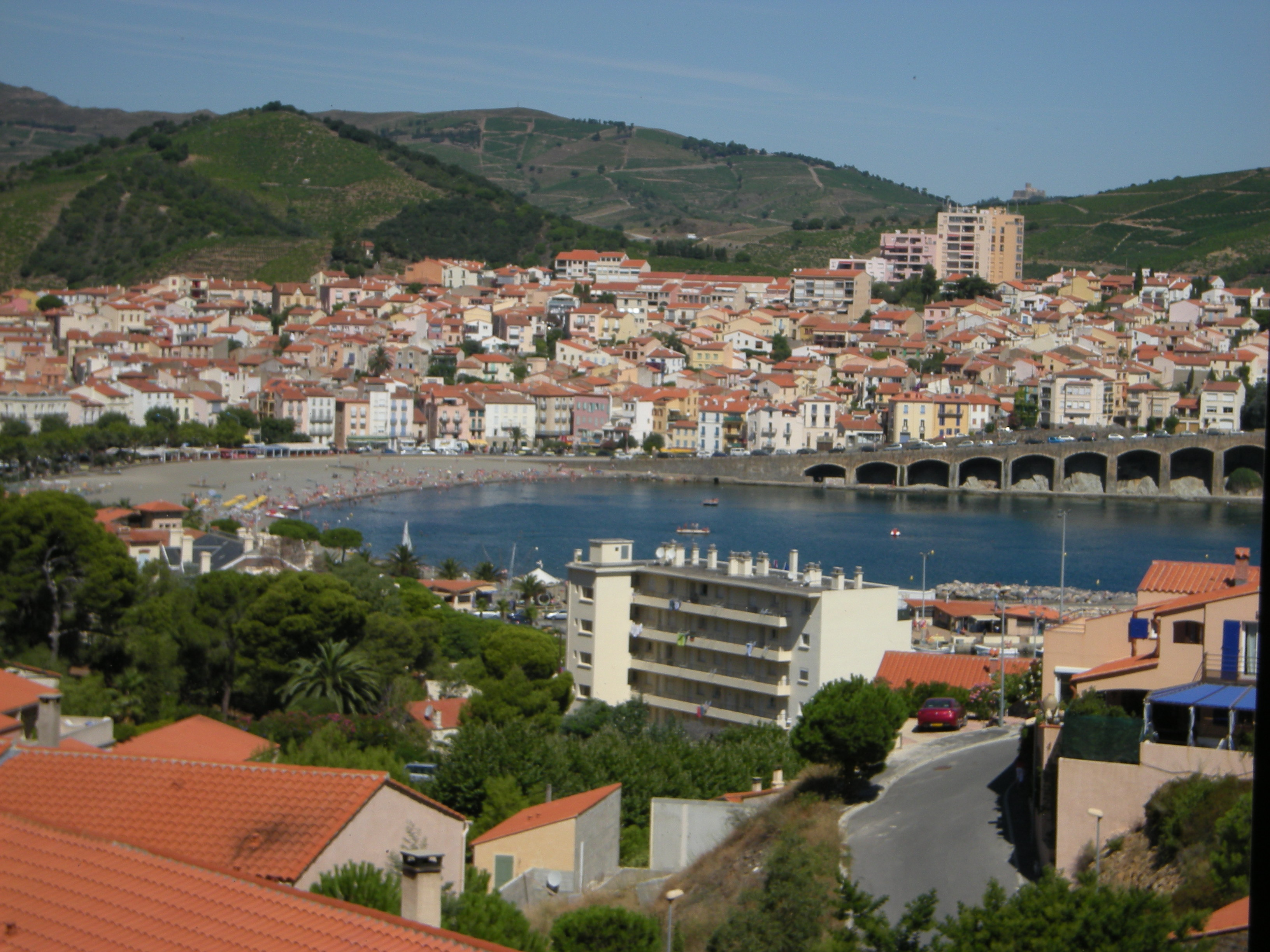 banyuls sur mer